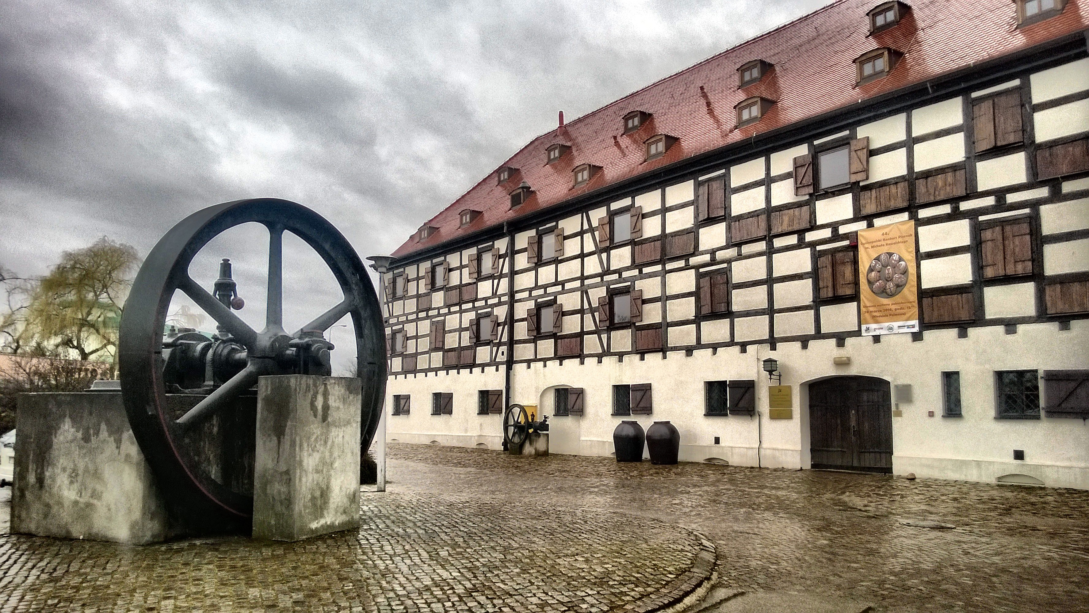 Zamoście, Gorzów Wielkopolski, Poland